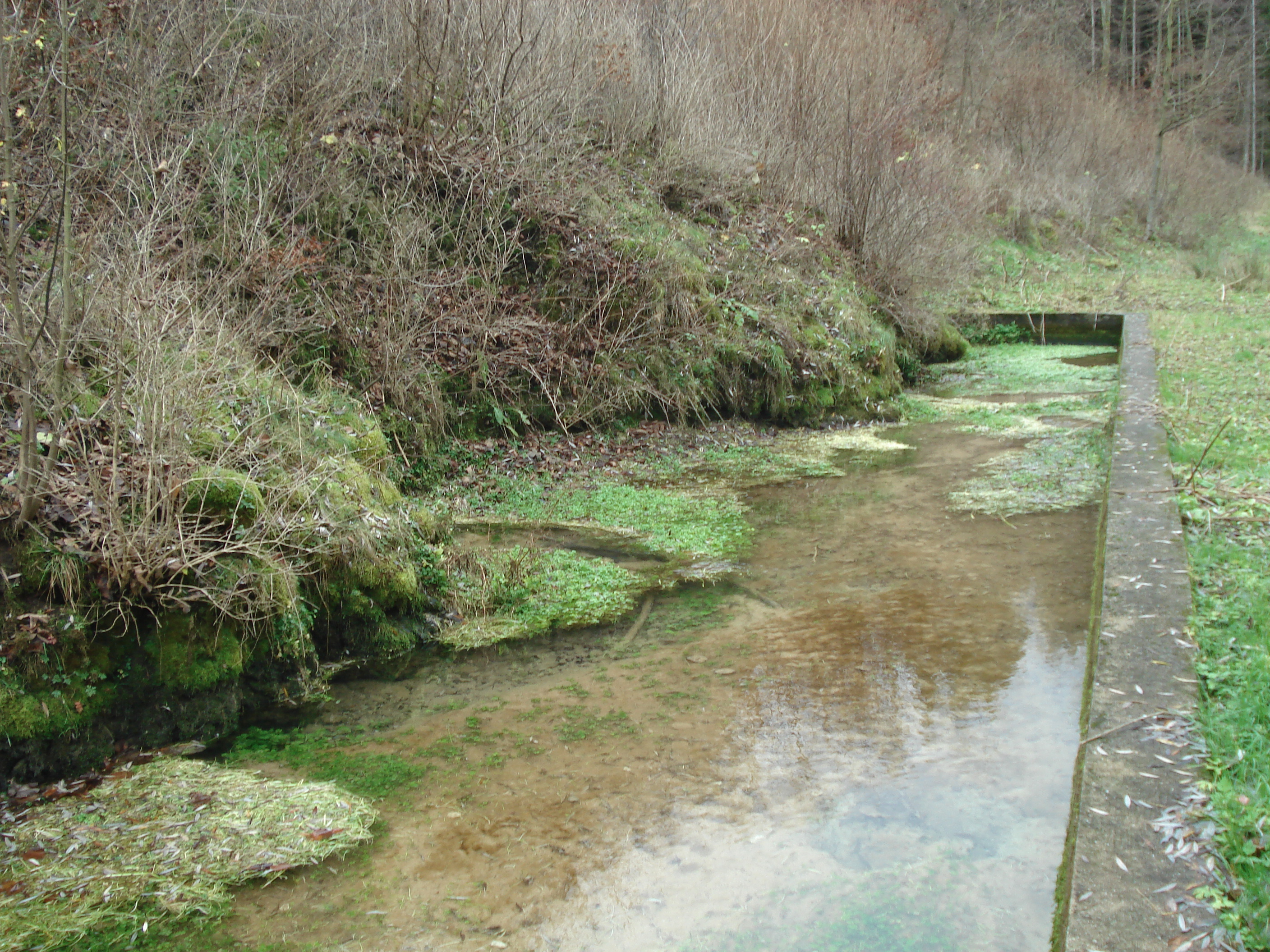 Die Karstquelle an der Ehrhardsmühle in Großziegenfeld